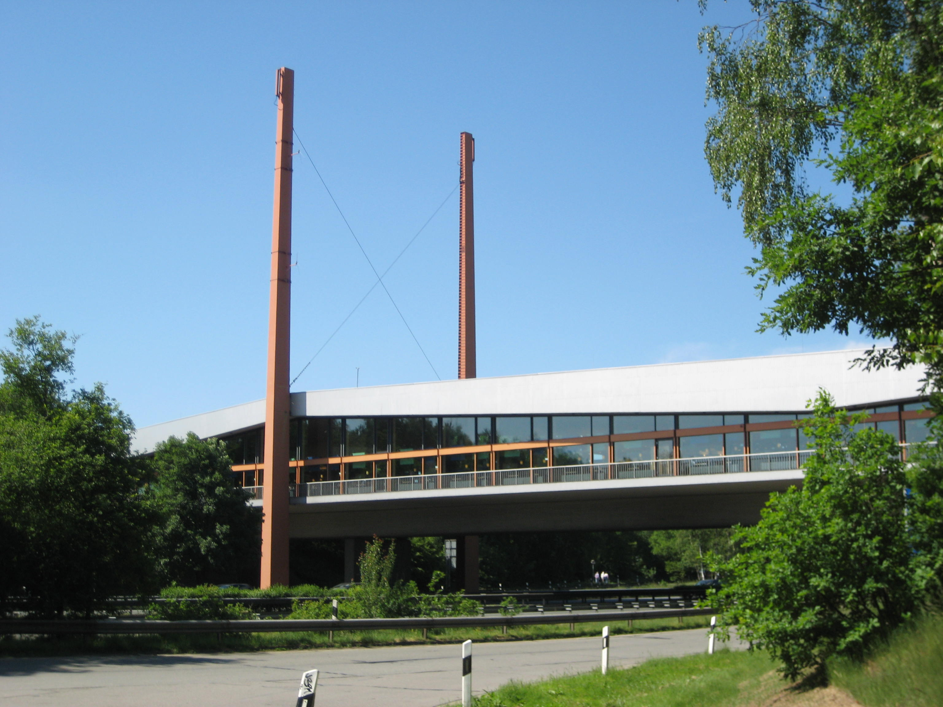 Südfront der Raststätte Dammer Berge an der Bundesautobahn 1 zwischen den Abfahrten Holdorf und Neuenkirchen-Vörden in Niedersachsen (fotografiert von der Ostseite)